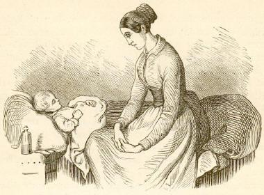 مادر روبه روی کودک بیمار خود